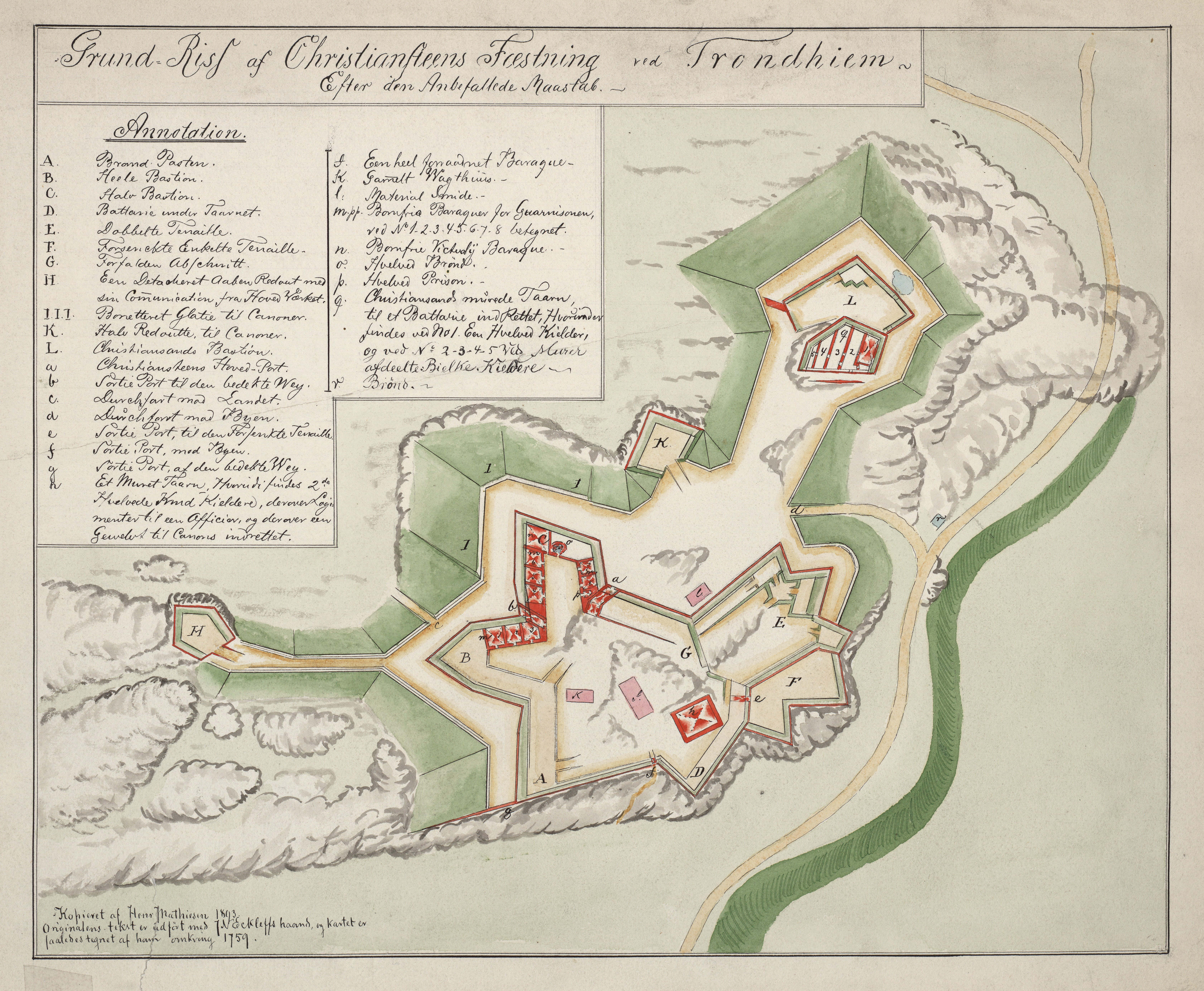 Kart fra Nasjonalbibliotekets kartsamling. Kartet er gitt ut i Håndtegnet ([1759?]) og viser Kristiansten festning, Trondheim.